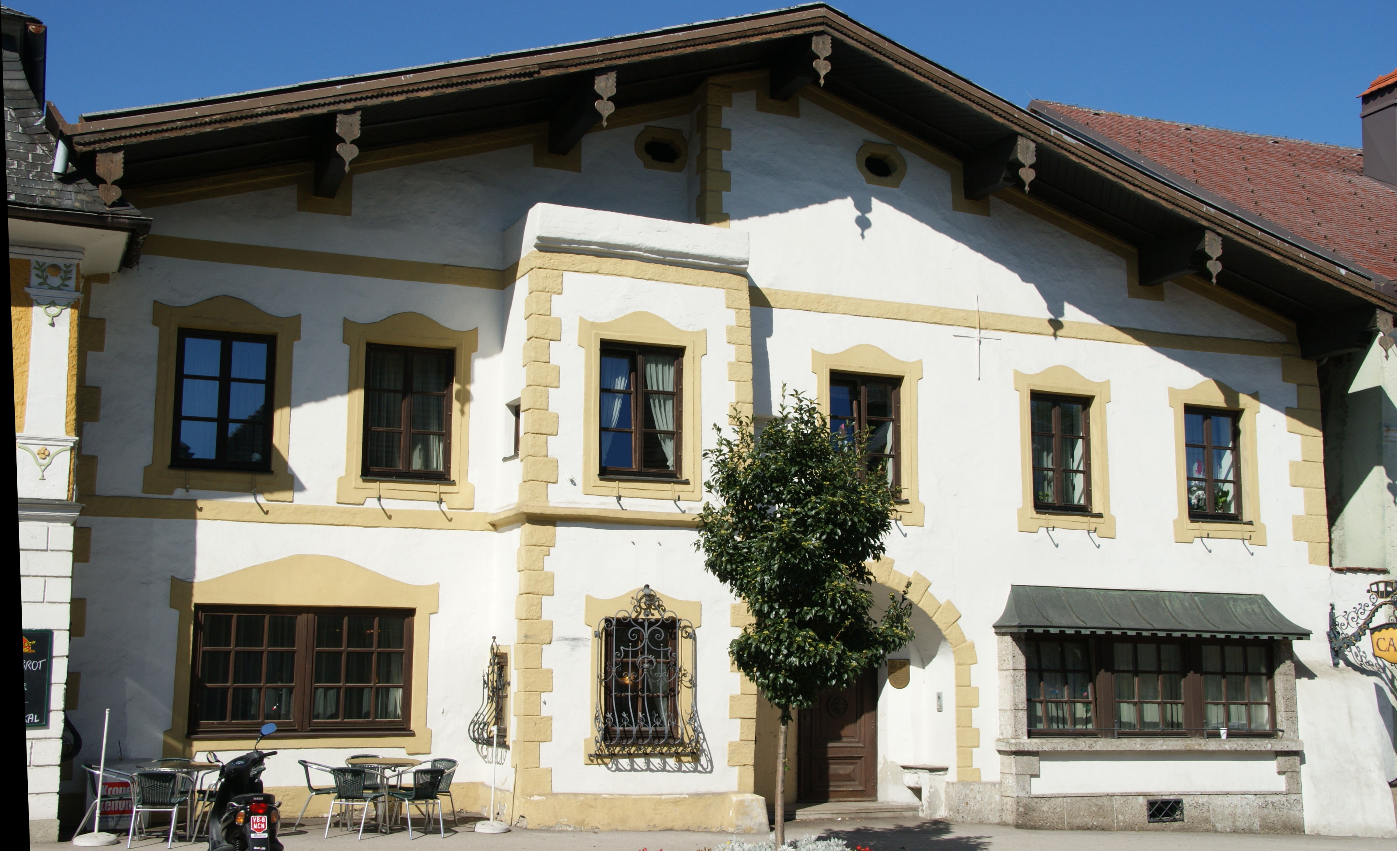 Gasthaus Zur Alten Post